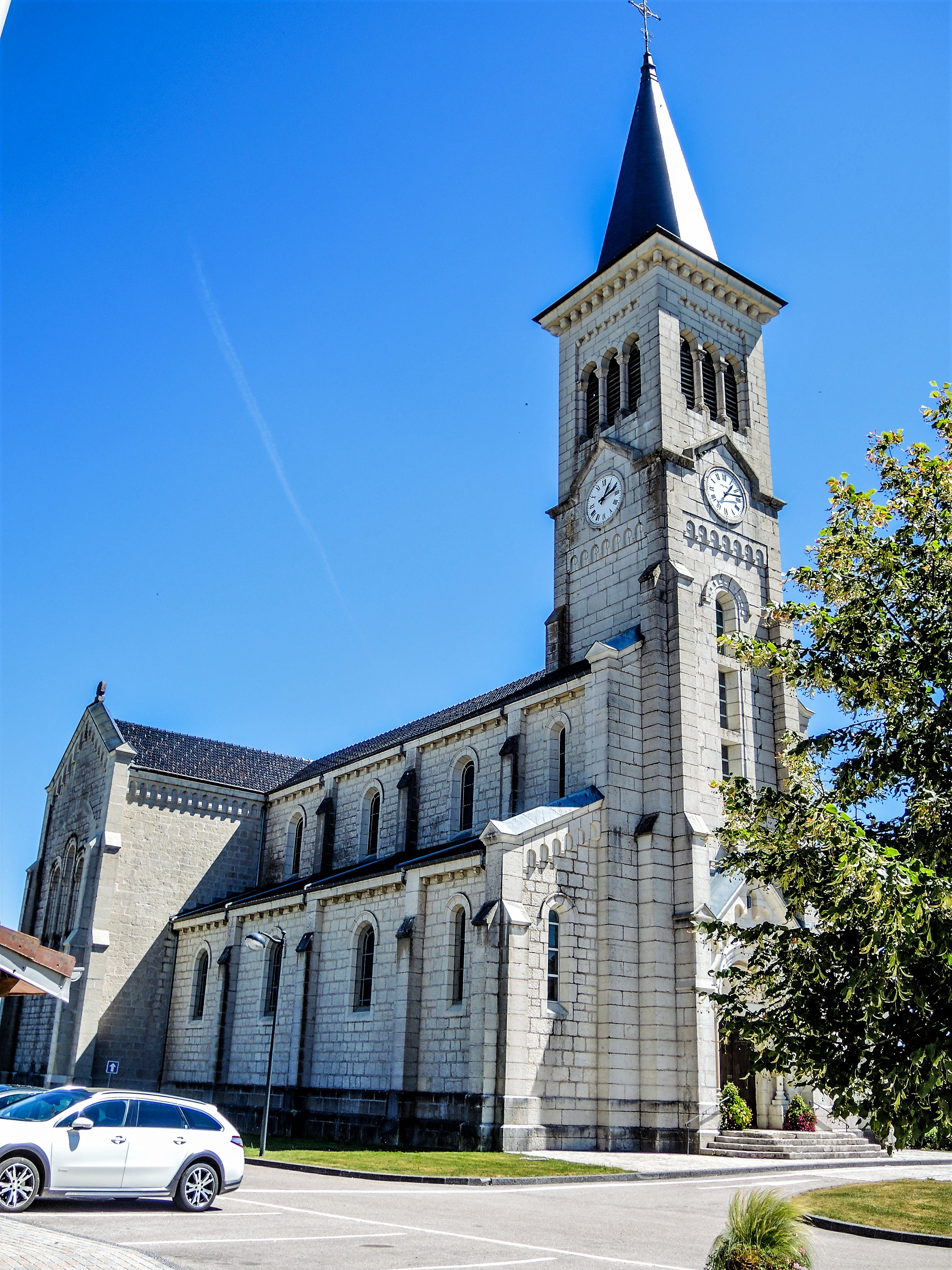 Eglise Saint-Sébastien de Frambouhans. Doubs